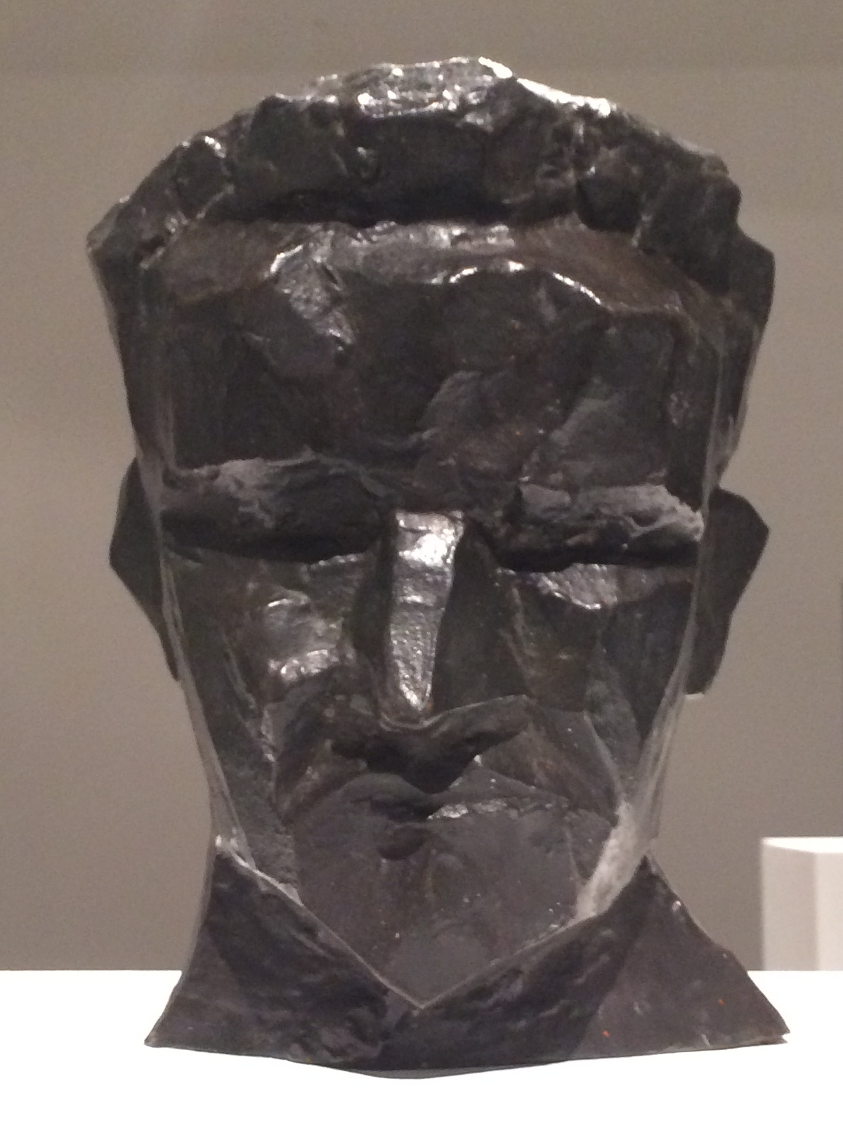 Srpskohrvatski / српскохрватски: izložak na "Retrospektivi Vojina Bakića" u MSU Zagreb